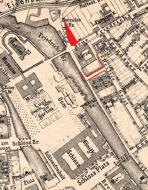 Lageplan des Berliner Börsen-Hotels (1874-1912).